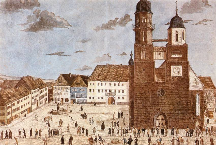 Die Stadtkirche in Meiningen um das Jahr 1800 (mit Marktplatz)